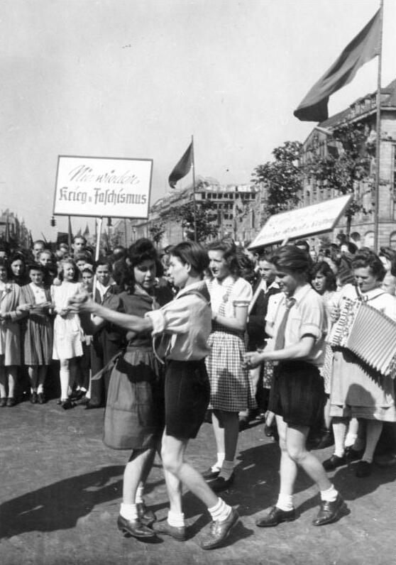 Berlin, Maidemonstration, Unter den Linden Zentralbild/Cürlis 1. Maifeier 1946, Unter den Linden 220-46 [Berlin.- Mai-Demonstration, tanzende Mädchen, Transparten "Nie wieder Krieg u. Faschismus"]